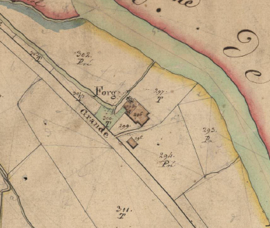 La Farga de Reiners en el Cadastre napoleònic del 1812 (Arxius Departamentals dels Pirineus Orientals)